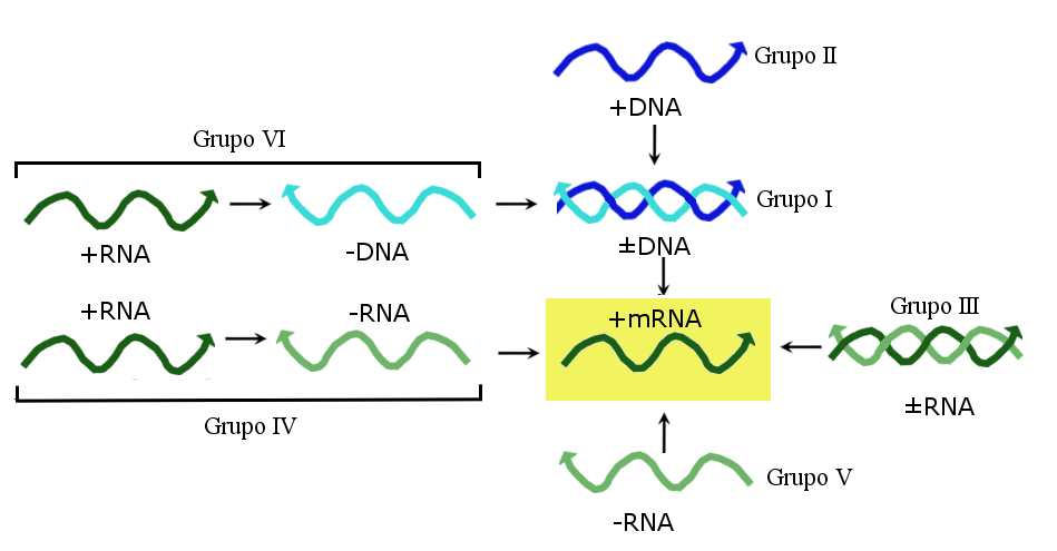 Representación esquemática del sistema de clasificación de los virus propuesto por David Baltimore